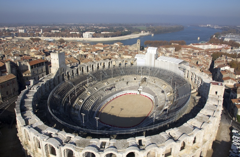 Photo prise par ballon captif par Paul-Louis FERRANDEZ de la société MEROPS-Photo